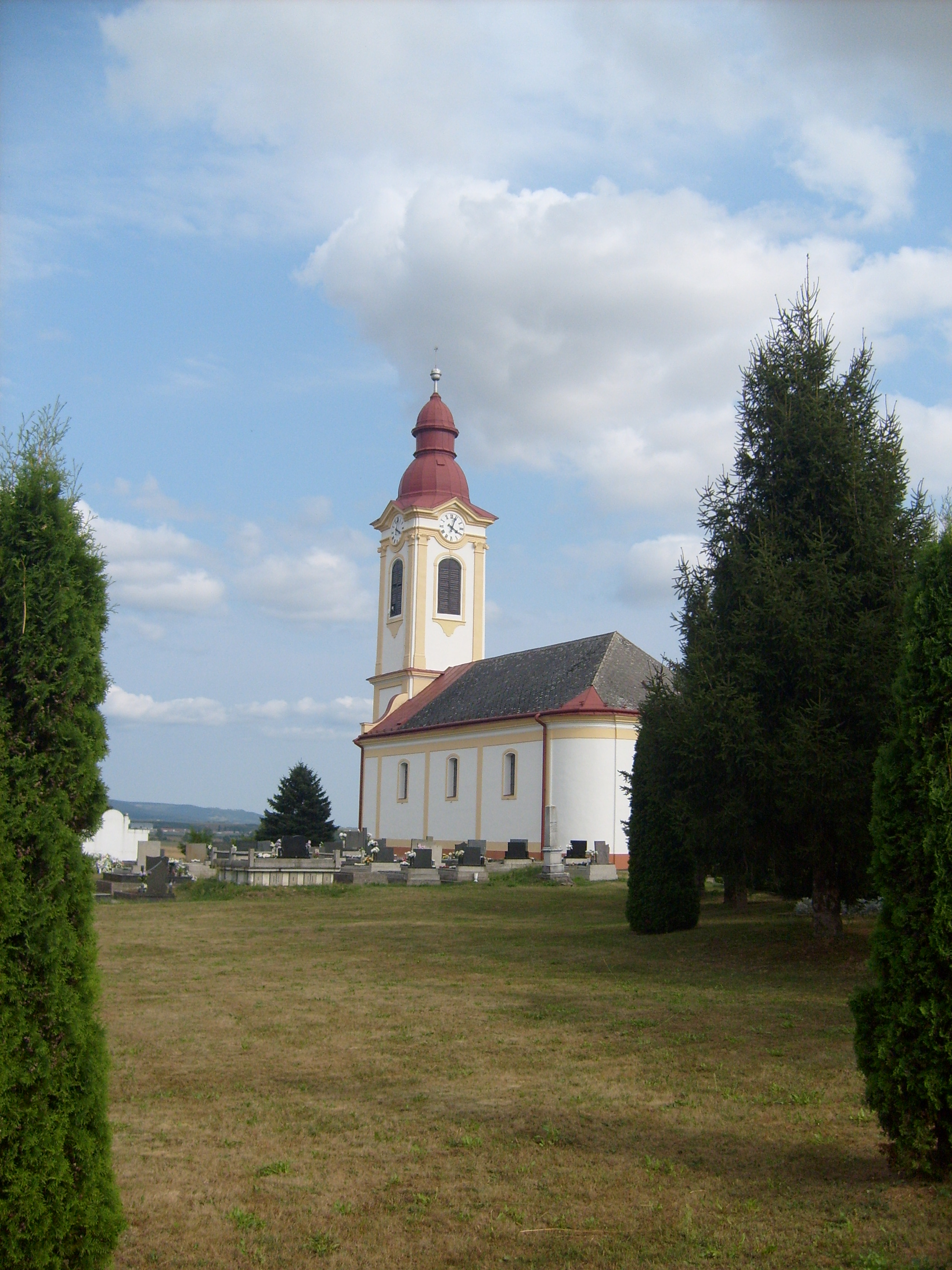 A hanvai református templom